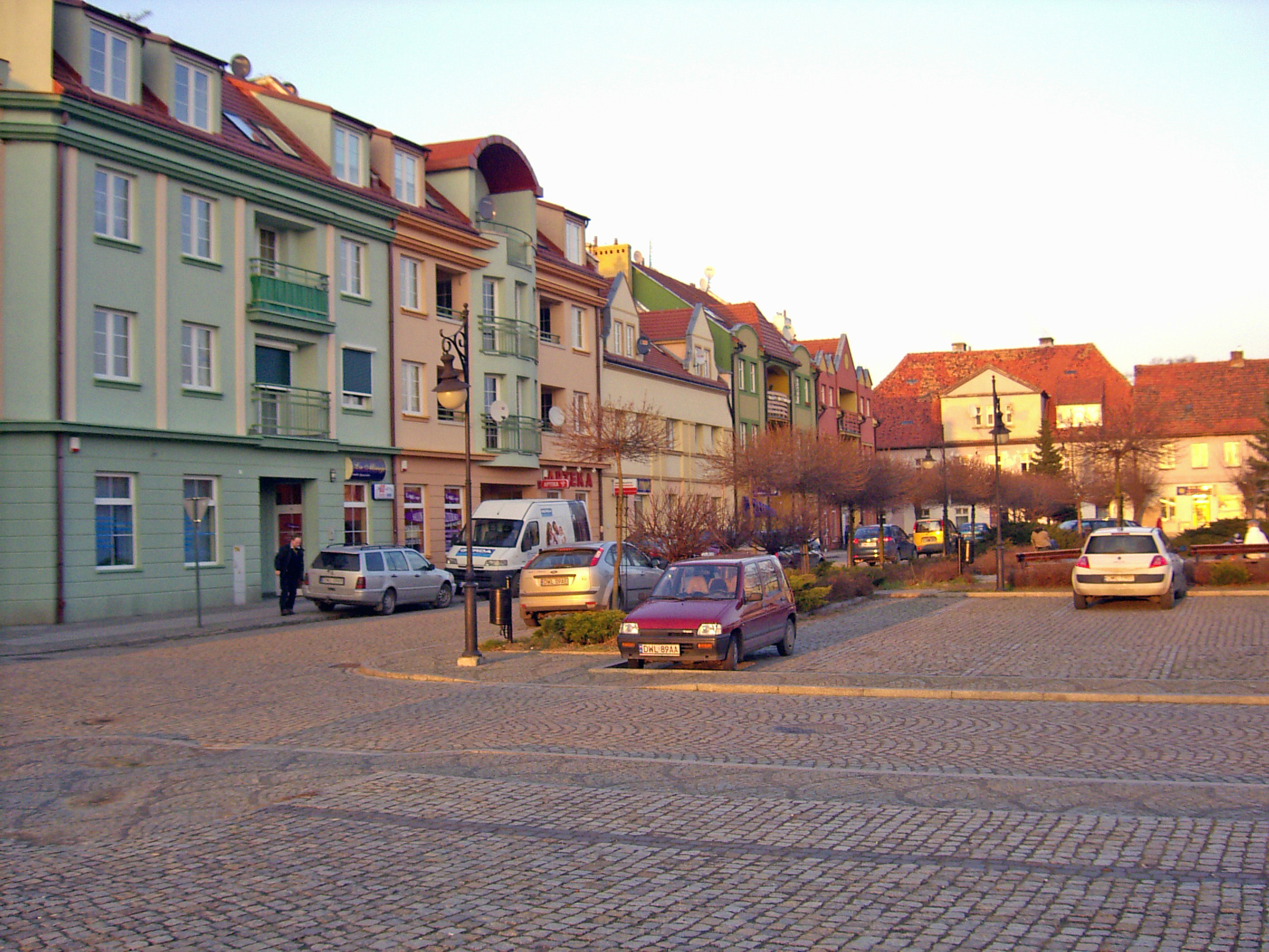 Północna ściana rynku.